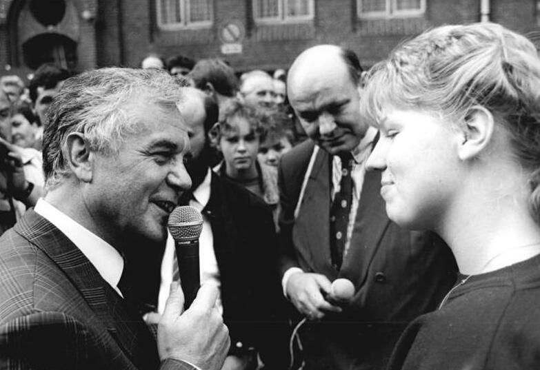 Nauen, Landtagswahl, Manfred Stolpe, Walter Momper ADN-Robert Roeske 7.9.90 Nauen: Wahlkampf. Der Auftakt des SPD-Wahlkampfes für das Land Brandenburg begann in Nauen. Der Spitzenkandidat für das Amt des Ministerpräsidenten, Konsistorialpräsident Dr. Manfred Stolpe (l), hatte nicht nur heute ein Ohr für die Sorgen der Wähler, mit denen er in der Straße der Jugend ins Gespräch kam. (M: Walter Momper, Regierender Bürgermeister von Westberlin) Abgebildete Personen: Momper, Walter: Regierender Bürgermeister von Berlin, SPD, Bundesrepublik Deutschland (GND 119010828) Stolpe, Manfred Dr.: 1990 Ministerpräsident von Brandenburg, SPD, Bundesverkehrsminister, Bundesrepublik Deutschland (GND 119013673)